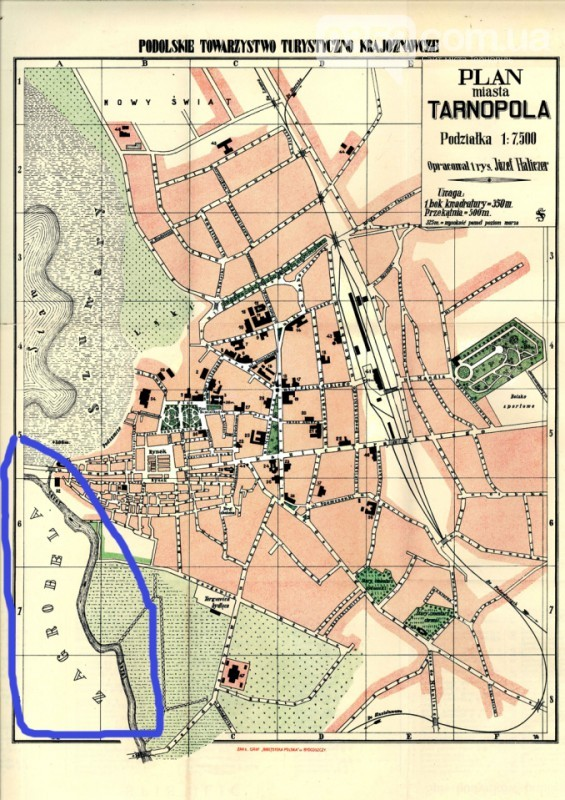 с. Загребелля біля Тернополя